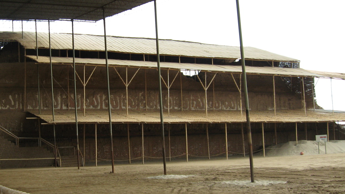 Mural lateral de la "Huaca de la Luna" en la zona arqueológica de Moche, área metropolitana de Trujillo (Perú).